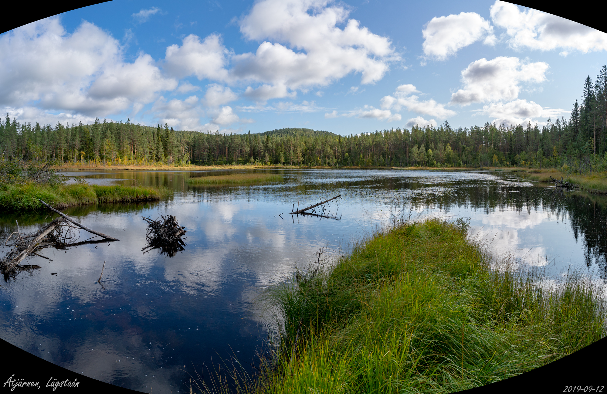 Åtjärnen vid Lägstaåns inlopp på västra sidan.